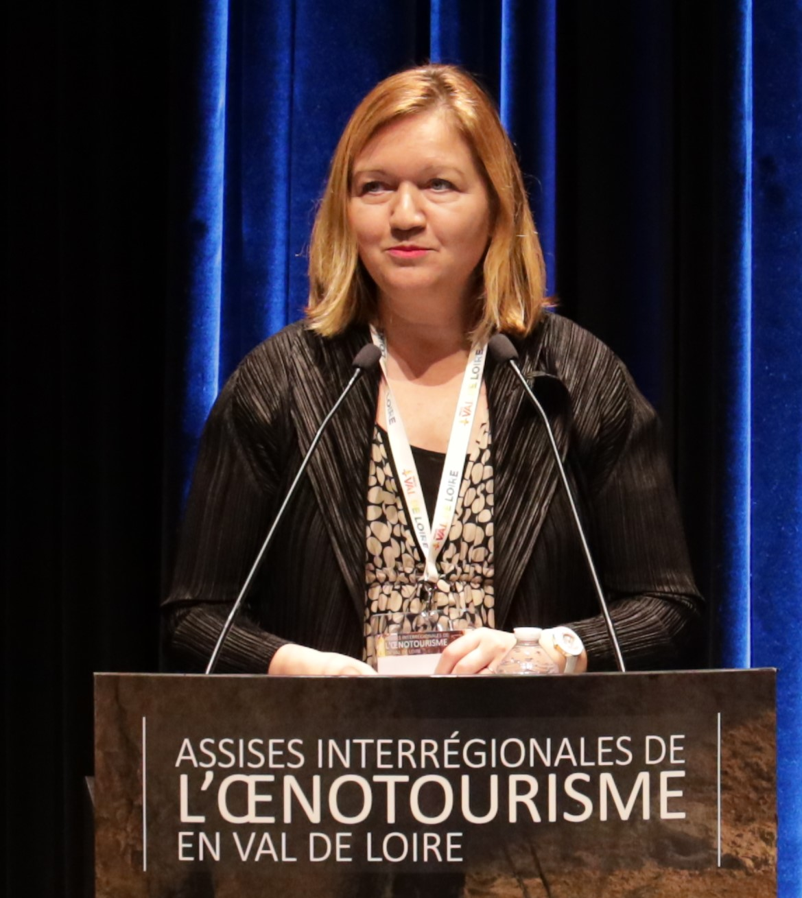 Caroline Leboucher, directrice d'Atout-France, lors des assises interrégionales de l'œnotourisme en Val de Loire 2019